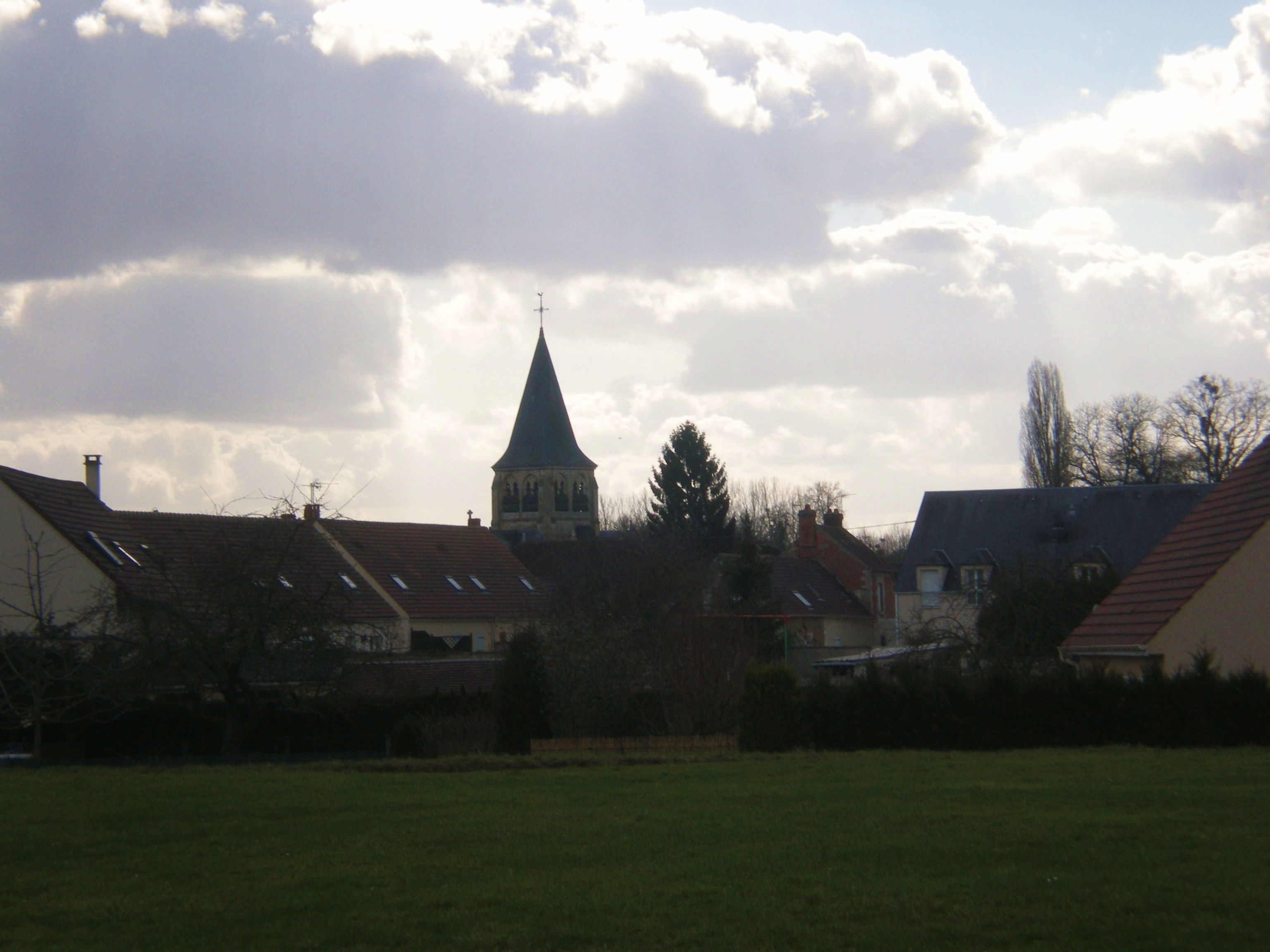 Breuil-le-Sec, vue générale